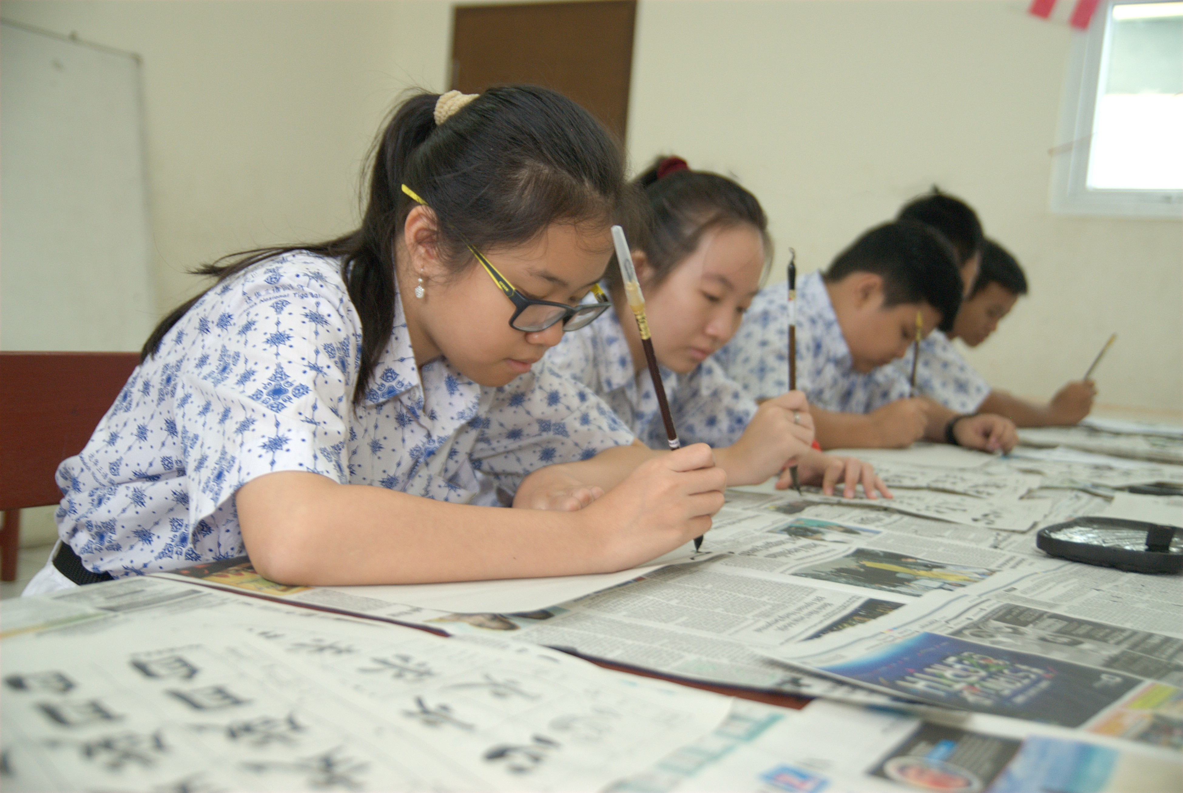 Siswa di Indonesia Melestarikan Seni Menulis Kaligrafi Cina. Salah satu sekolah (SMP) Swasta melestarikan budaya Tionghoa, salah satunya menulis kaligrafi Cina sebagai bentuk mengenal dan mendalami budaya nenek moyang